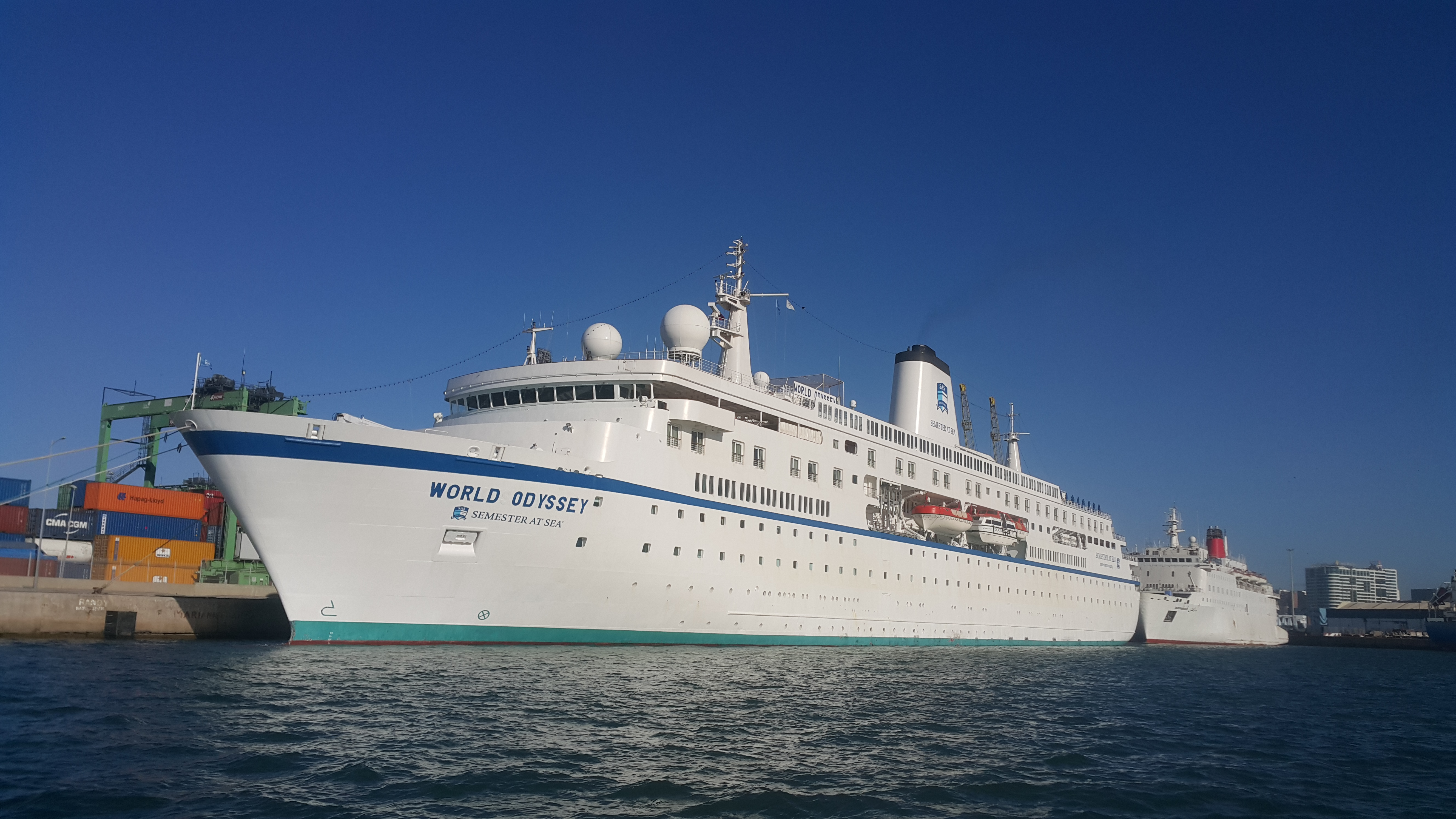 Paquebot WORLD ODYSSEY à Casablanca - Morocco - IMO: 9141807 Pavillon: Bahamas Genre du navire: Passenger Année de Construction: 1998